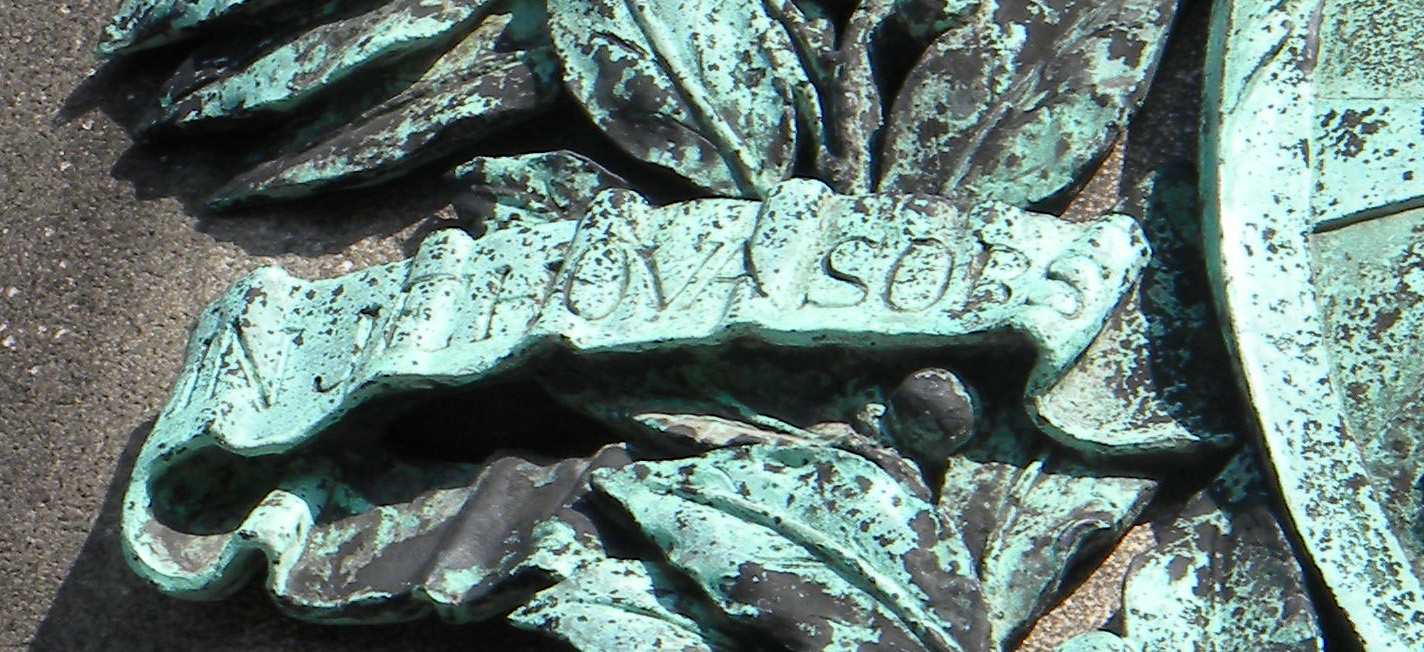 Karl X Gustav och hans valspråk på statyn i Malmö: "In Jehovah sors mea Ipse faciet"